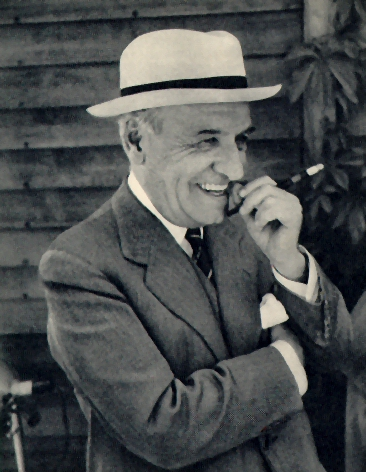 Ortega y Gasset en un fotografía tomada por la prensa en los años 20.